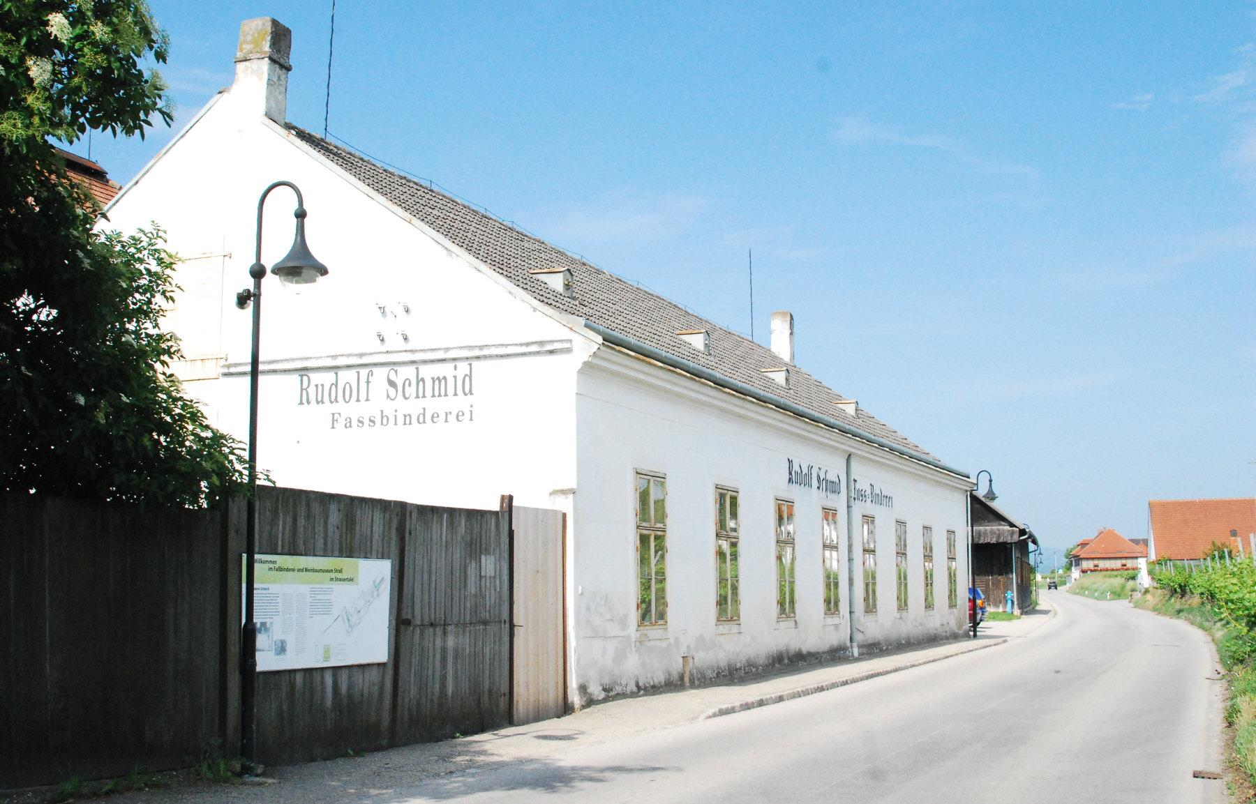 Bindereimuseum in Straß im Straßertale in Niederösterreich